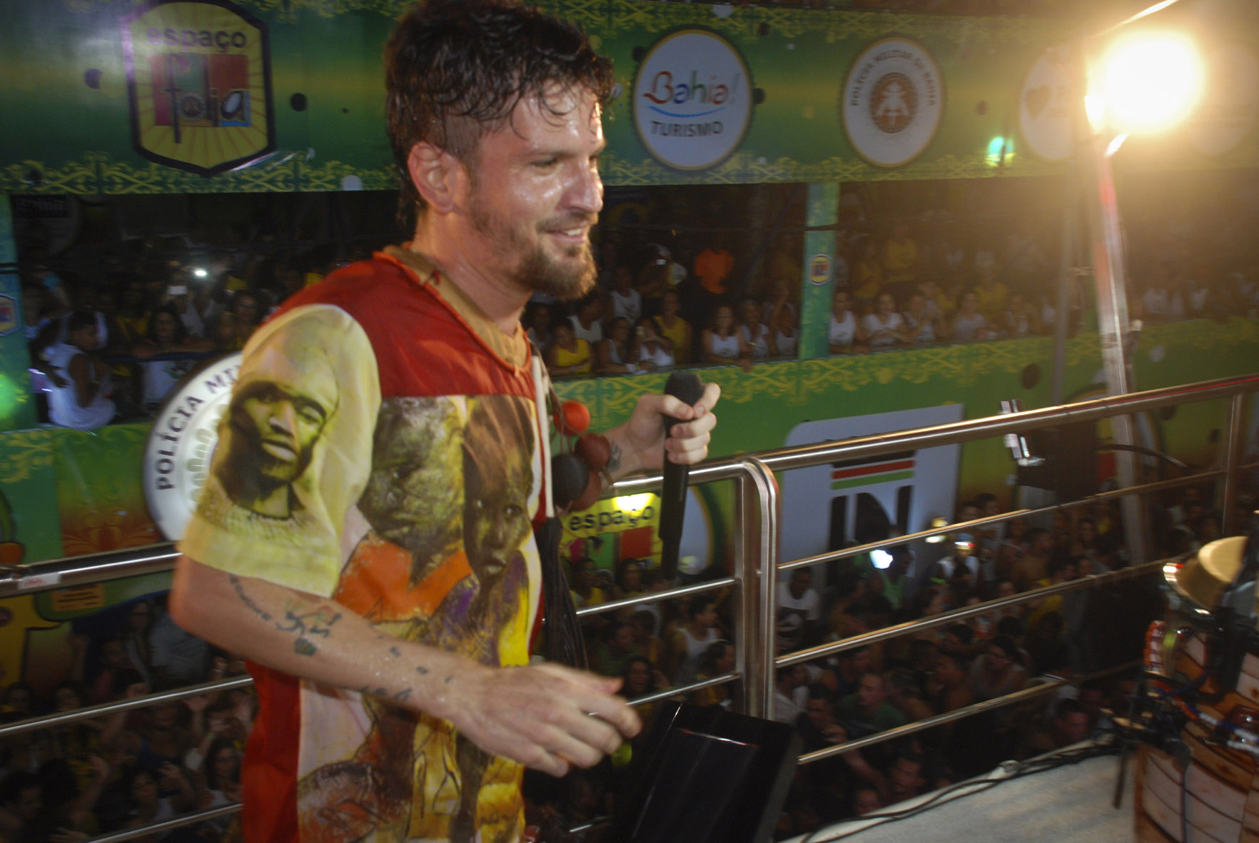 18 - 2014_02_28 Sex - Carnaval SSA - Circuito Dodô - Cerveja & Cia Saulo Fernandes - Foto João Ramos - Bahiatursa